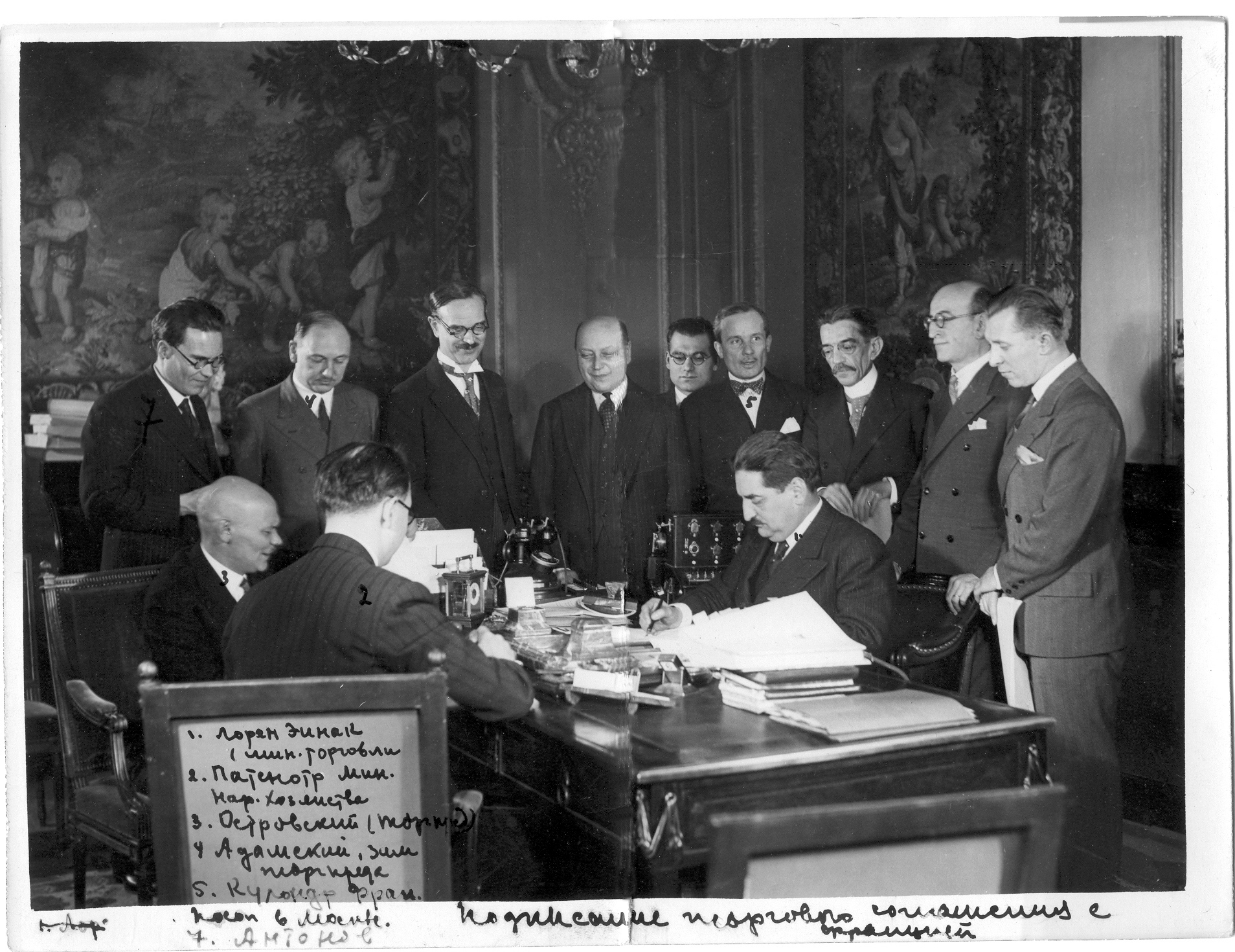 Подписание первого советско-французского торгового соглашения 11.01.1934. На фотографии отмечены: 1. Лоран Эйнак 2. Раймон Патенотр 3. Михаил Семёнович Островский 4. Ян Людвигович Адамский 5. Роберт Кулондр 7. Константин Владимирович Антонов